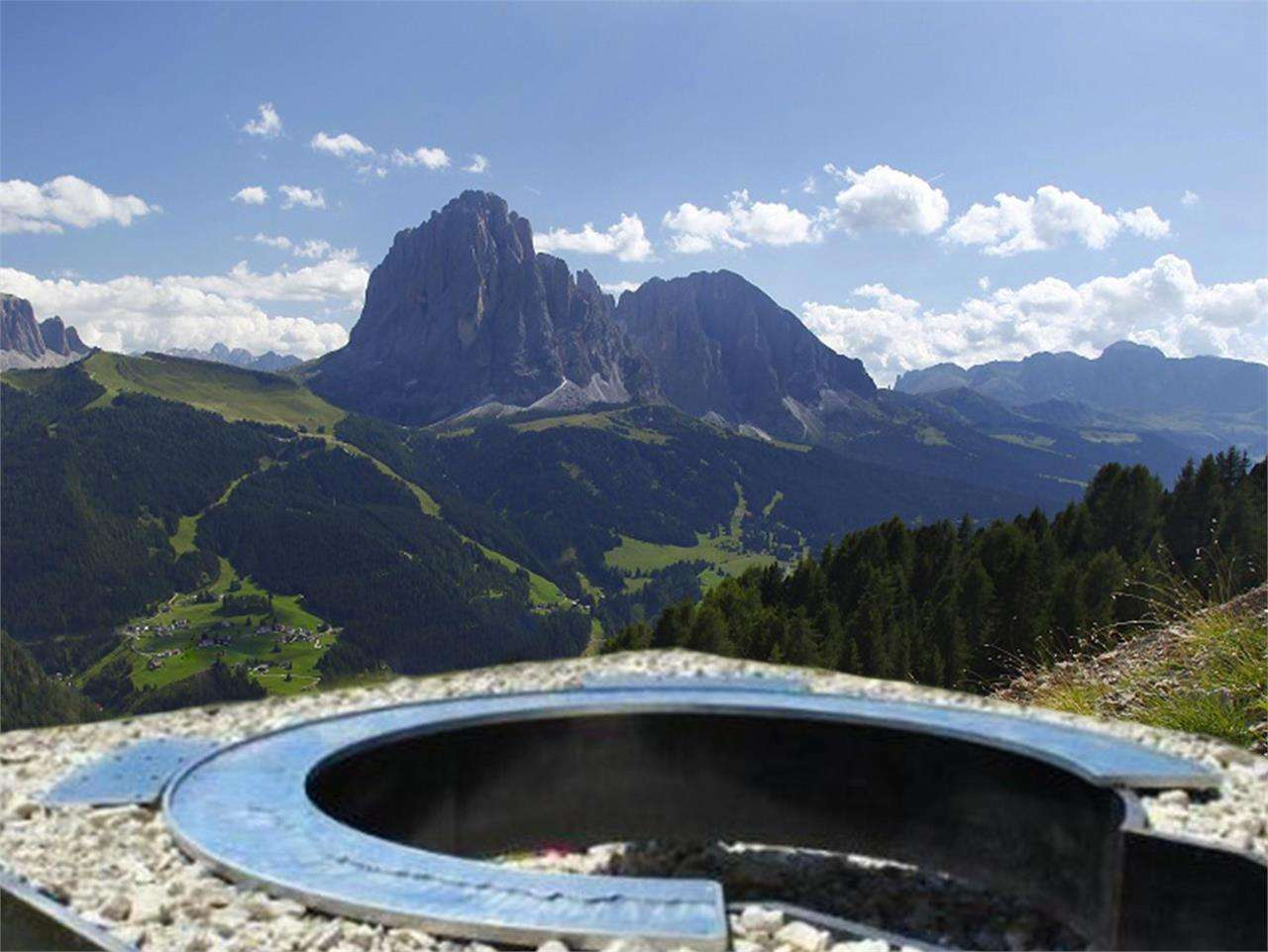 UNESCO Plattform auf der Mastlè Alm in St.Christina in Gröden